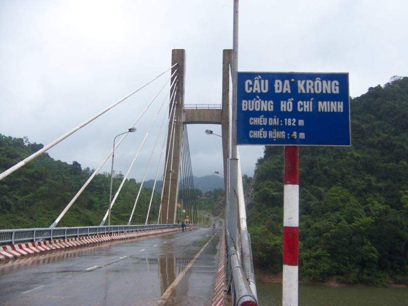 Đa Krông bridge, Quang Tri, Vietnam.